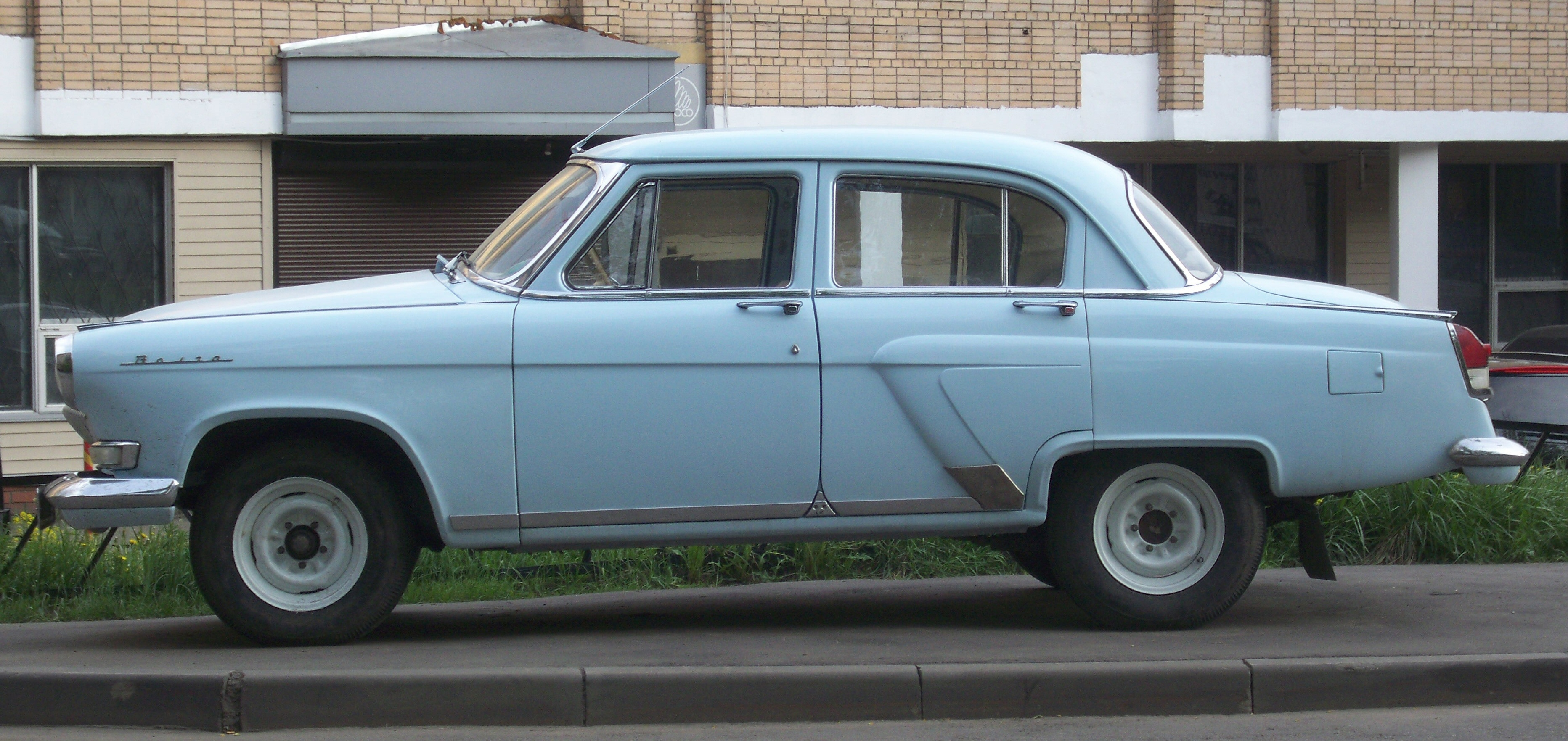 Волга ГАЗ-21 (голубая)